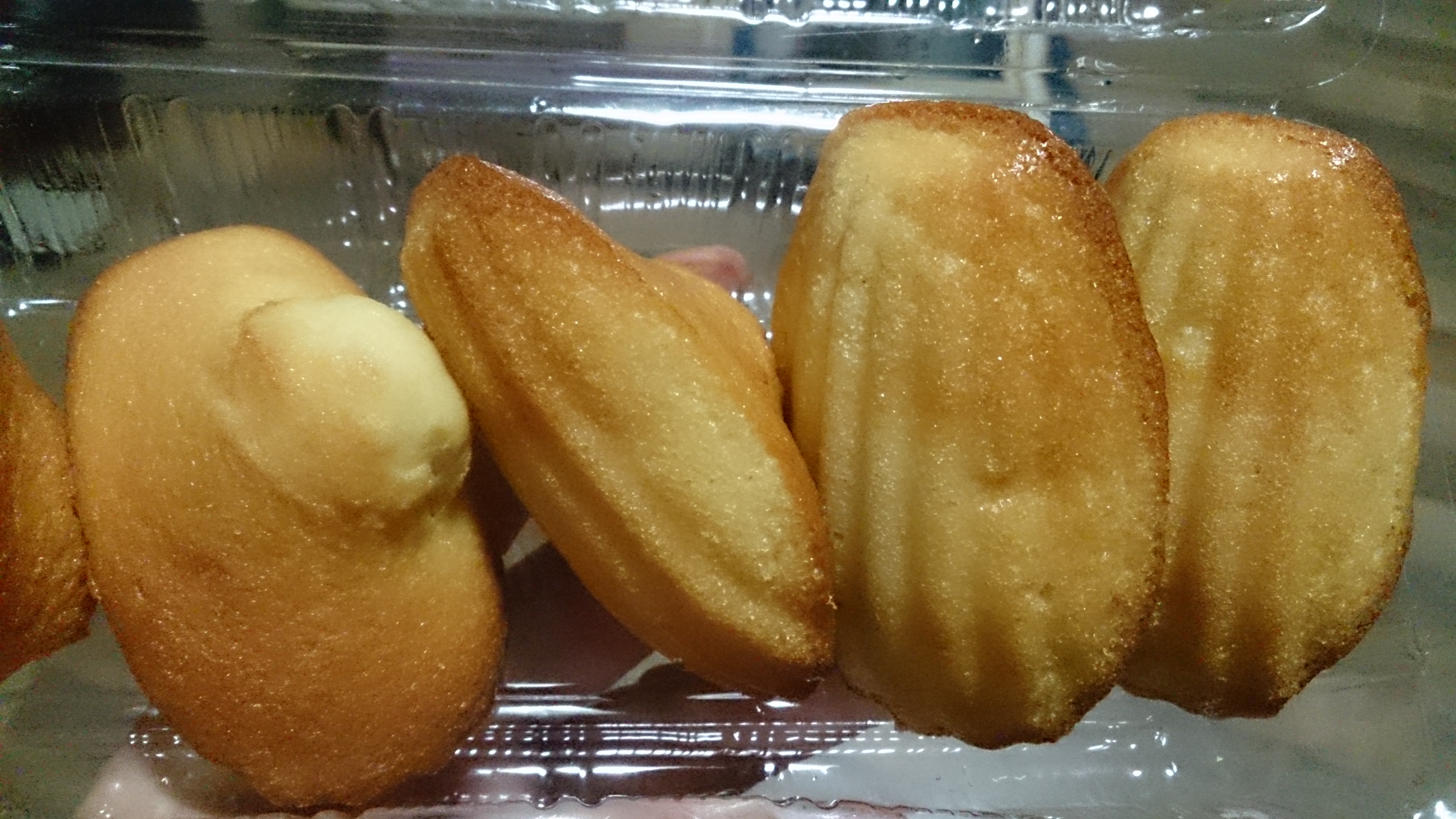 madeleines